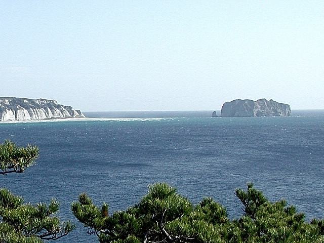 早島 (東京都新島村・式根島ぐんじ山展望台から撮影, 左側は新島) Hayashima Island (Izu-Islands, Tokyo, JAPAN)